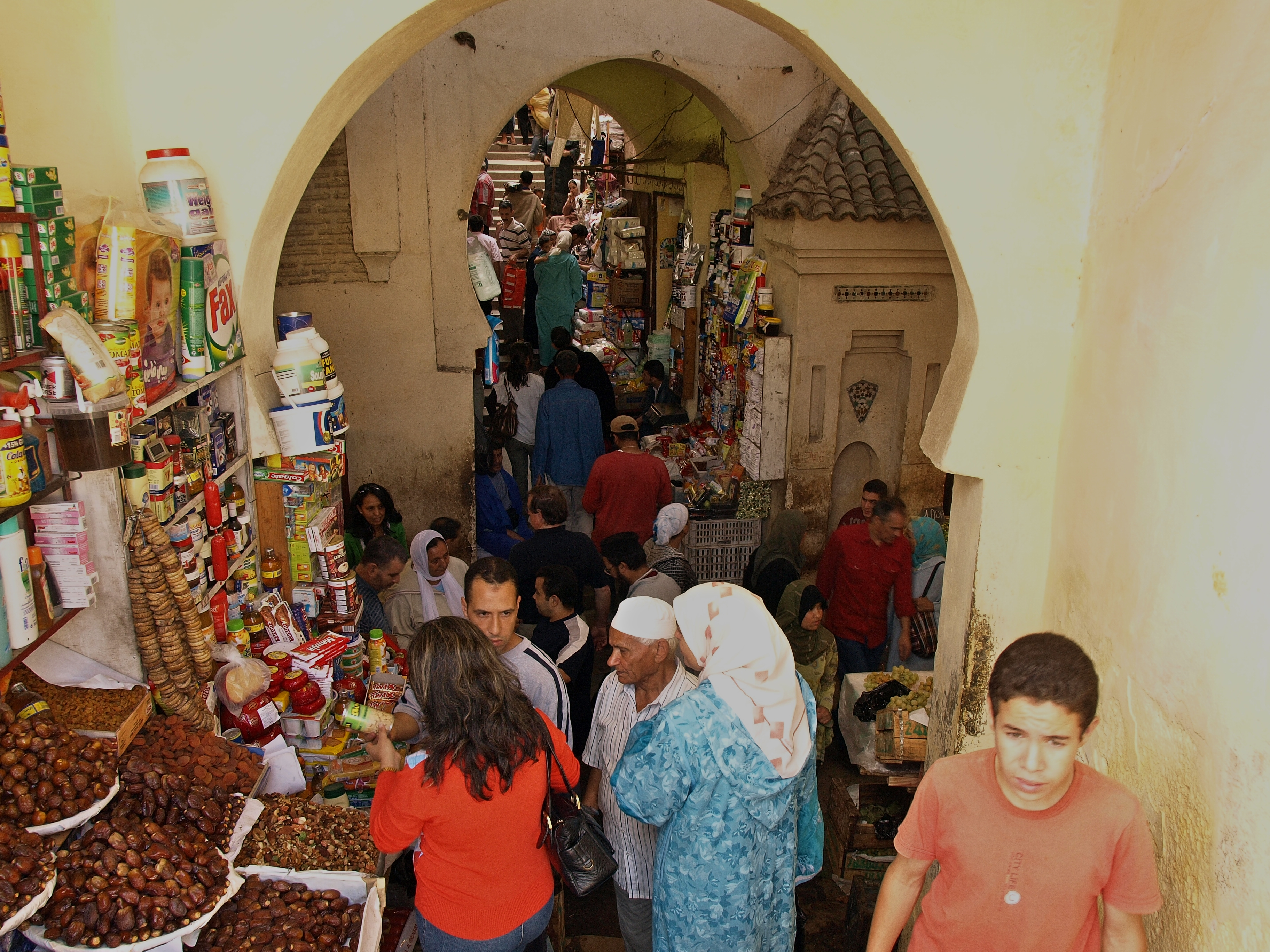 typische Einkaufsgasse in den Souks der Medina von Fez